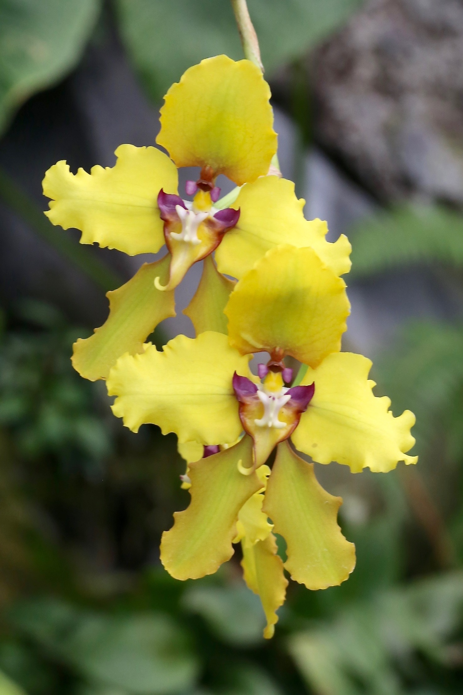 Quito Botanical Garden